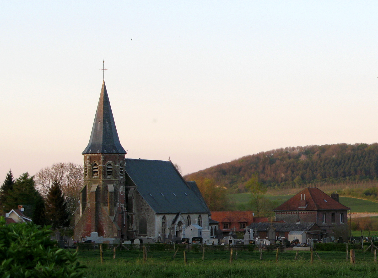 Bours (Pas-de-Calais, France) - L'église se dresse au milieu du cimetière. .